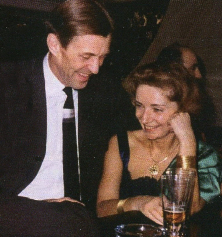 Sune Lindström och Malene Bjørn vid invigningen av Wenner-Gren Center